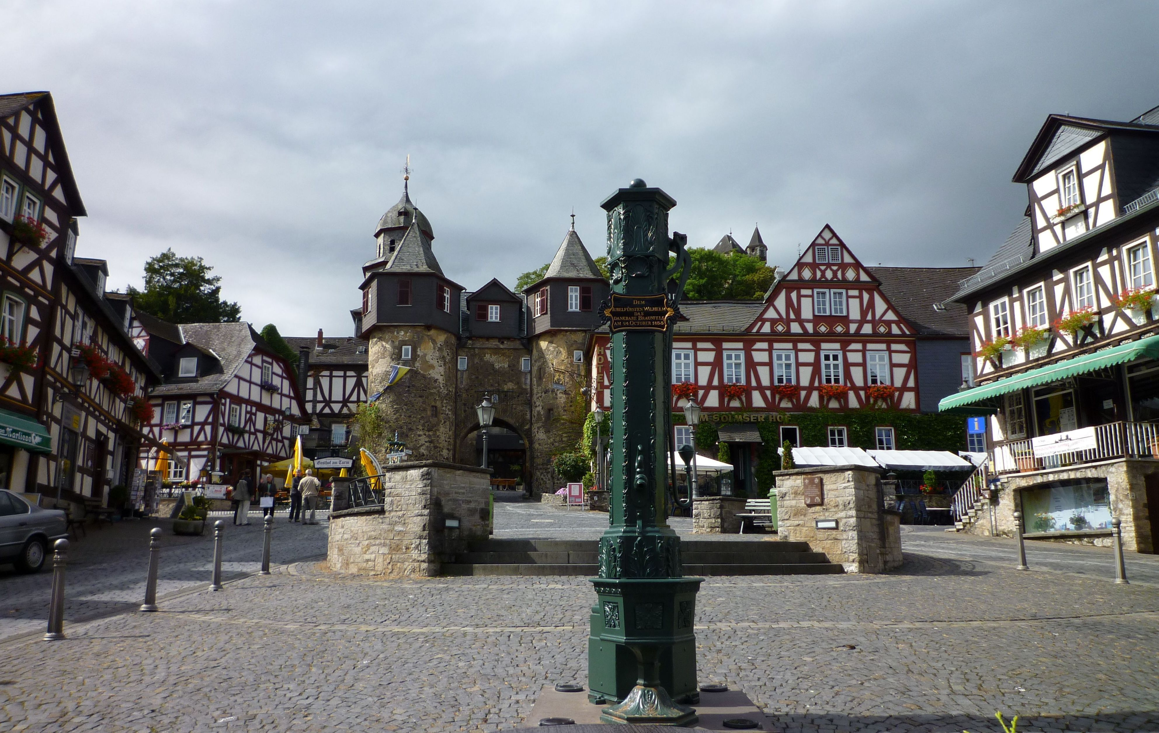 Braunfels - Marktplatz mit Brunnen und Fachwerkhäusern.jpg